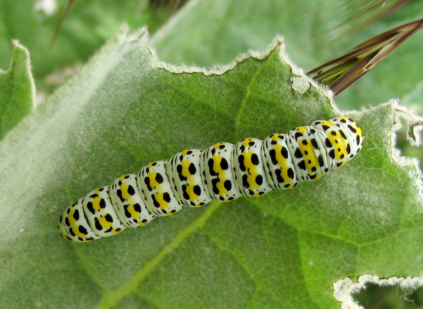 Shargacucullia verbasci (Linneaeus, 1758), caterpillar